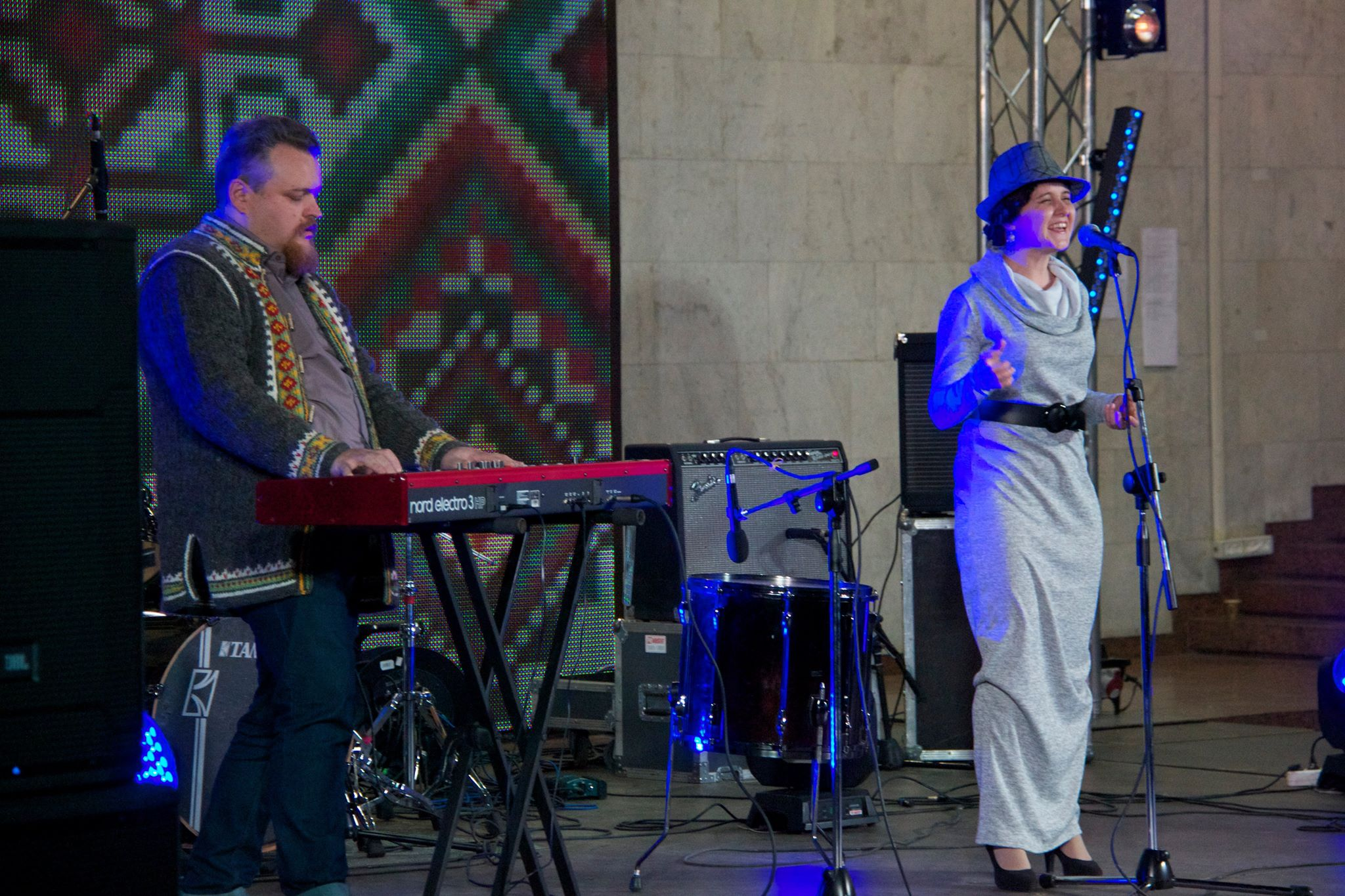 Коко Меленж